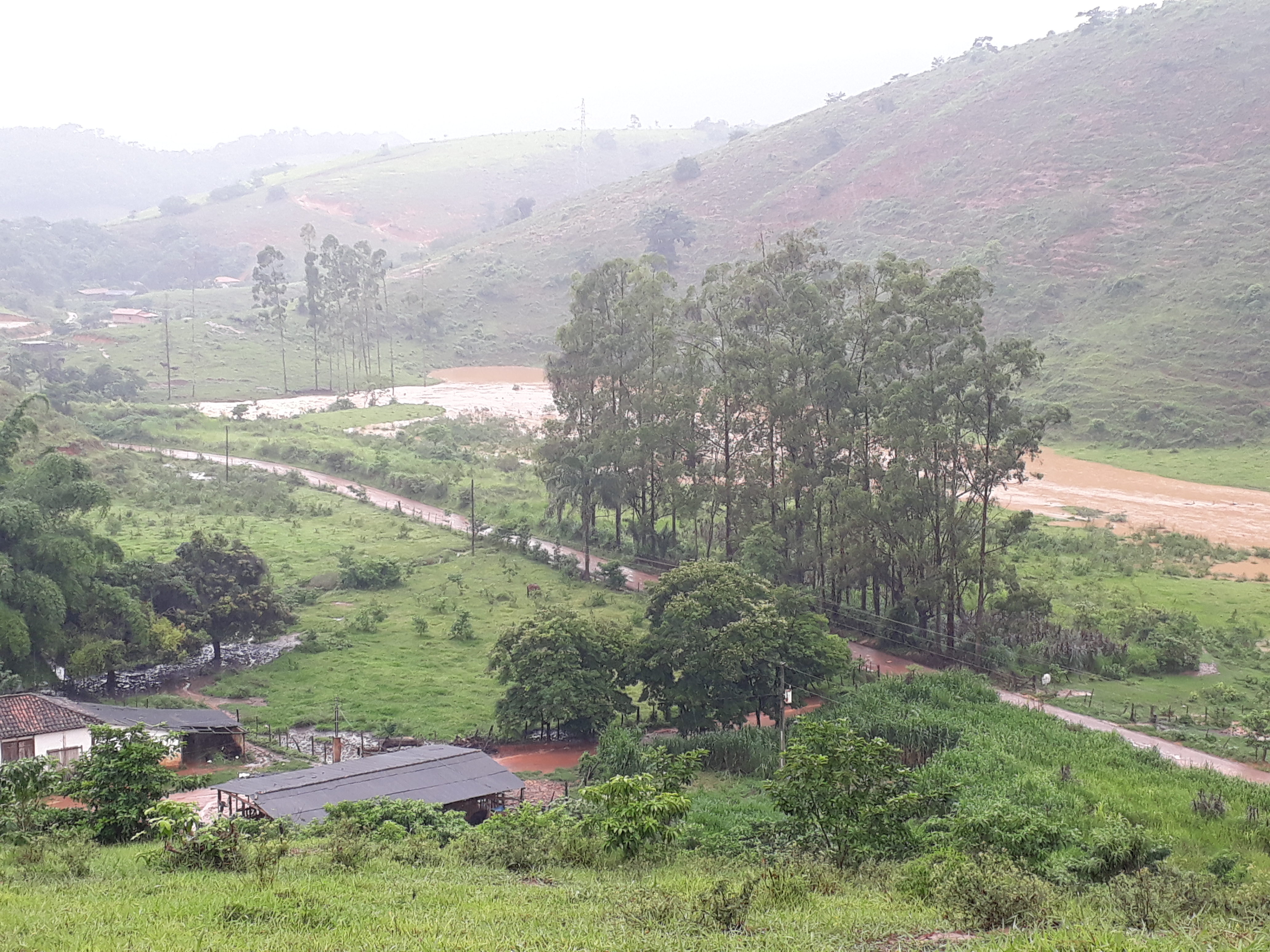 Período chuvoso, nível do Córrego Jacutinga elevado.